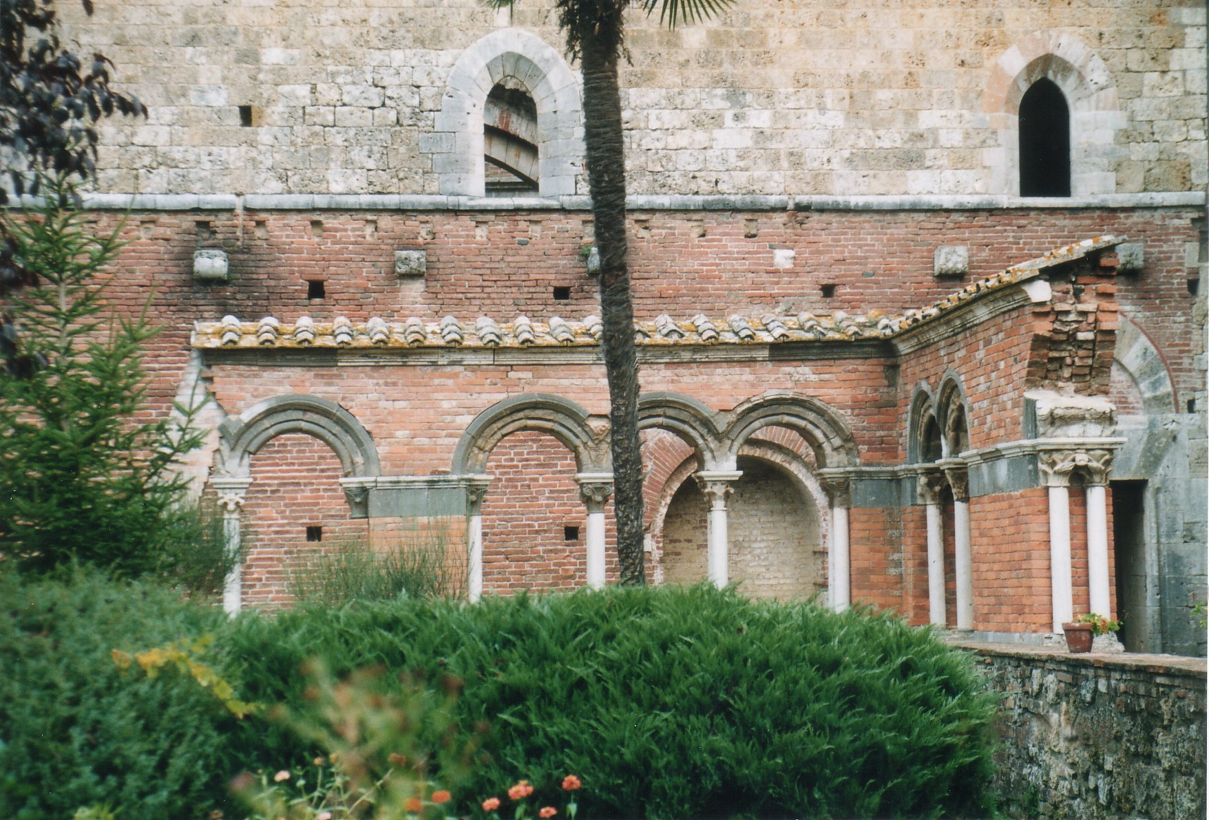 Rovine dell'abbazia di San Galgano (Siena). Particolare del chiostro.